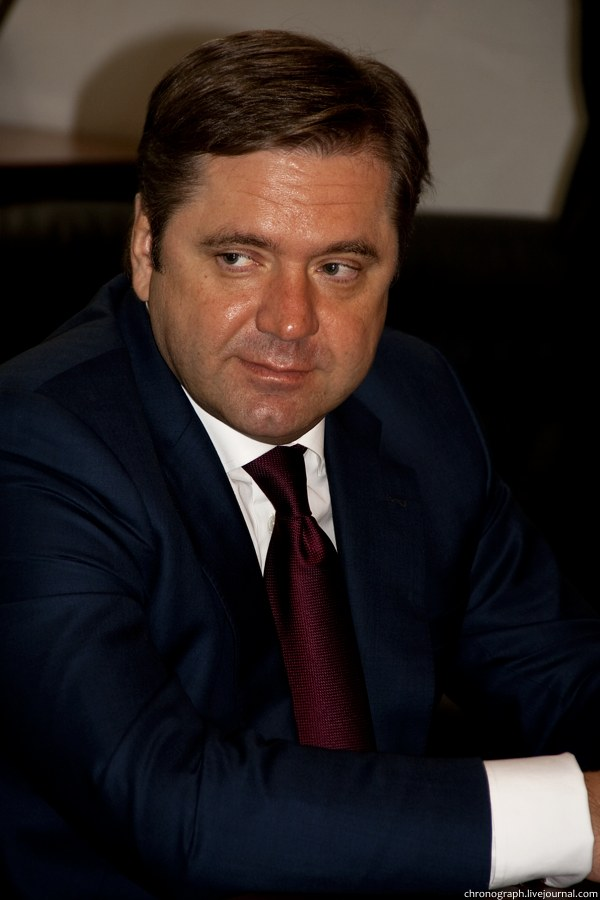 Министр энергетики России С.И. Шматко, Москва, 2011, 6-я Международная Энергетическая Неделя.